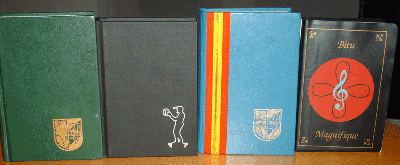 Foto van verschillende studentenliedboeken die in België gebruikt worden; v.l.n.r. : groene editie KVHV Studentencodex, VUB-liedboek, blauwe editie KVHV Studentencodex; Bitu Magnifique